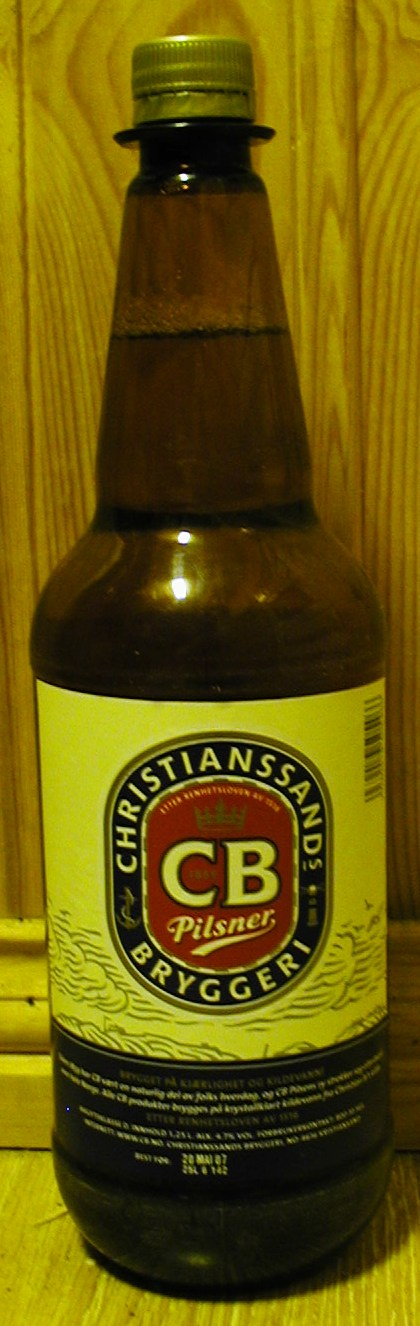 Flasche (1,25l) der Cristiansand bryggerie.